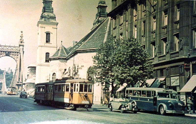 Forgalom a régi Erzsébet hídon - Budapest (1940)